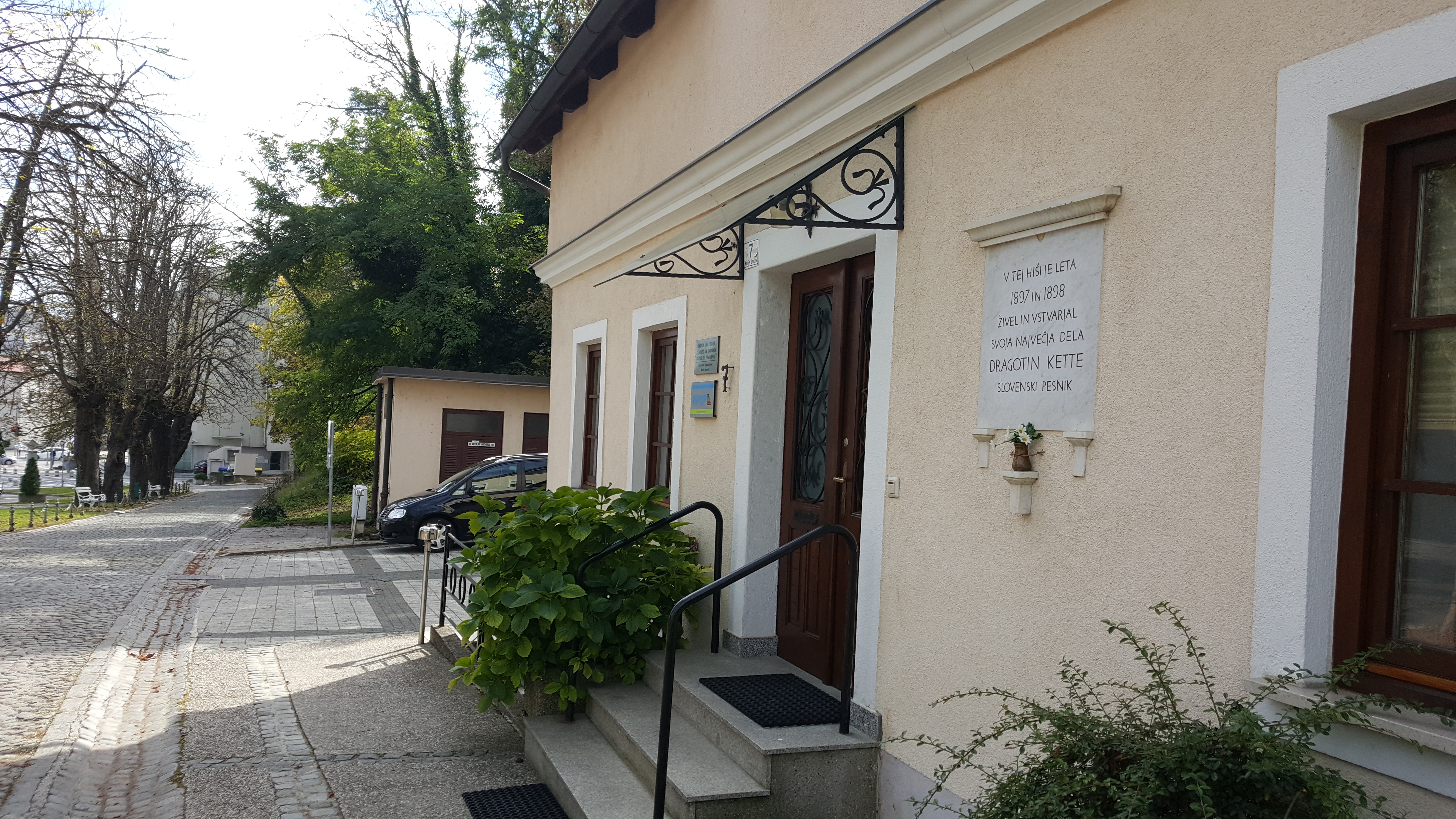 Hiša s spominsko ploščo